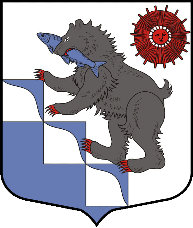 Герб города Подпорожье